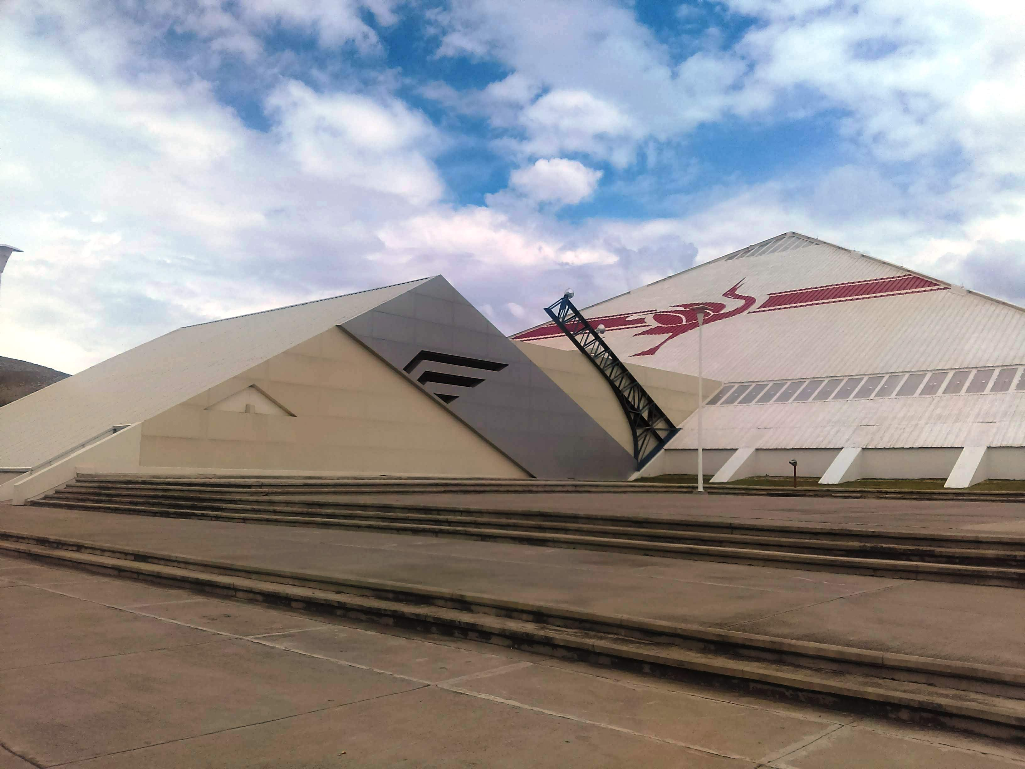 Polideportivo Universitario Carlos Martínez Balmori.